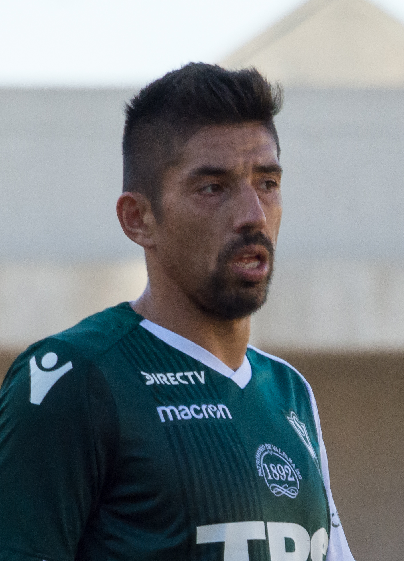 Jorge Ampuero, San Luis v Santiago Wanderers, Estadio Municipal Lucio Fariña Fernández, Quillota, Región de Valparaíso, Chile.